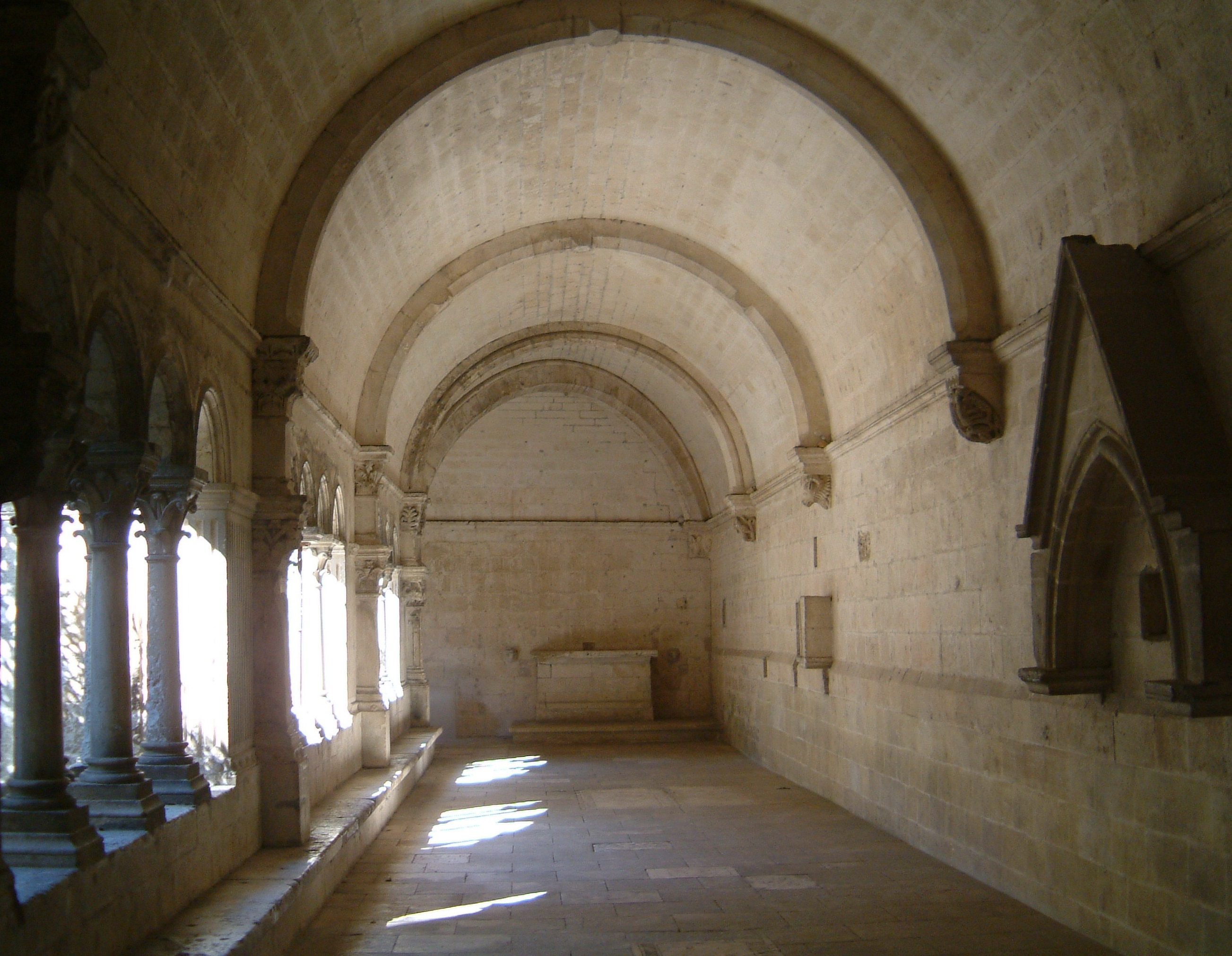 Frankreich-Montmajour-Maurinerkloster-Kreuzgang